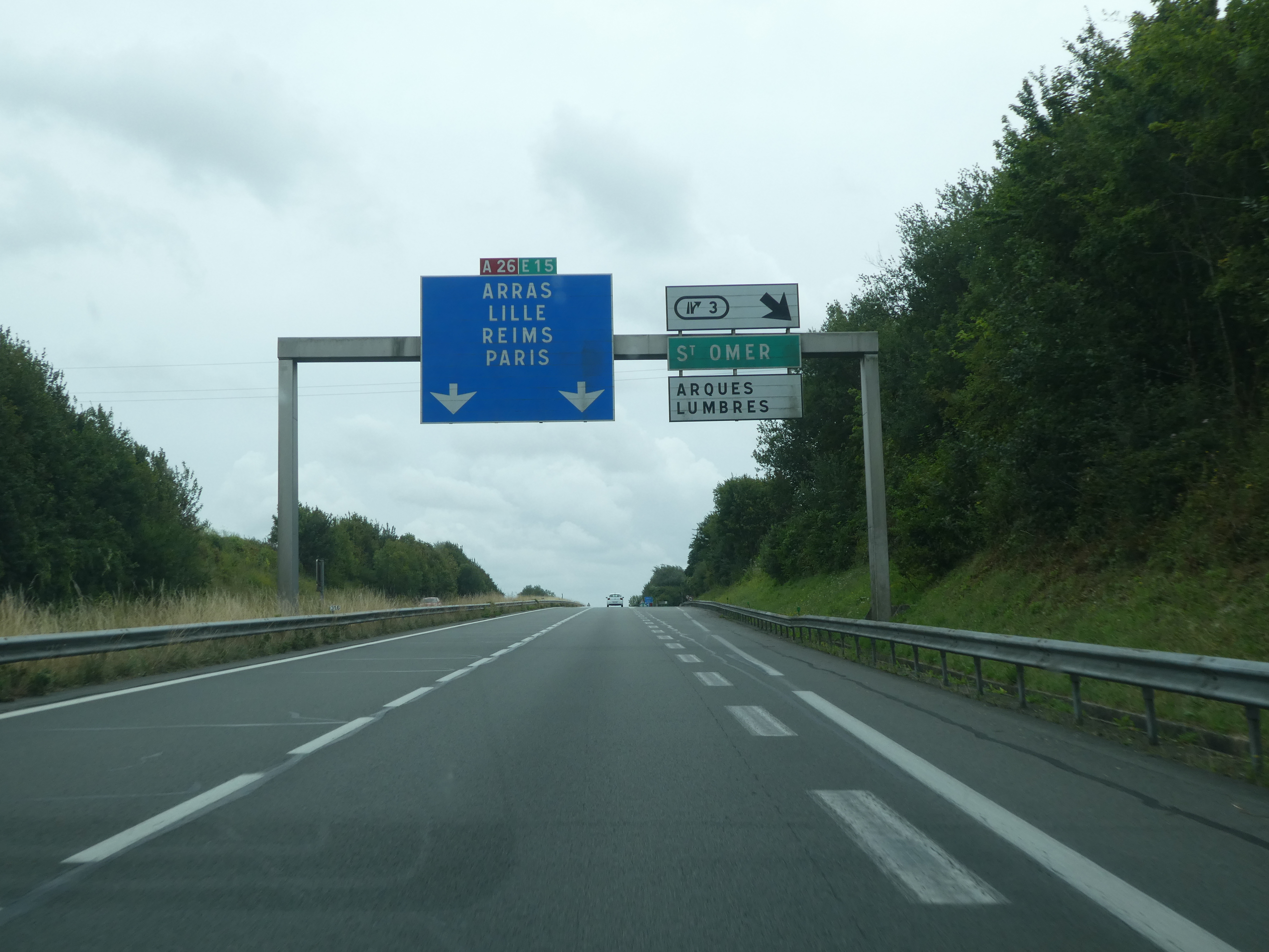 Autoroute A26 - sortie n°3 Saint Omer, direction Nord-Sud